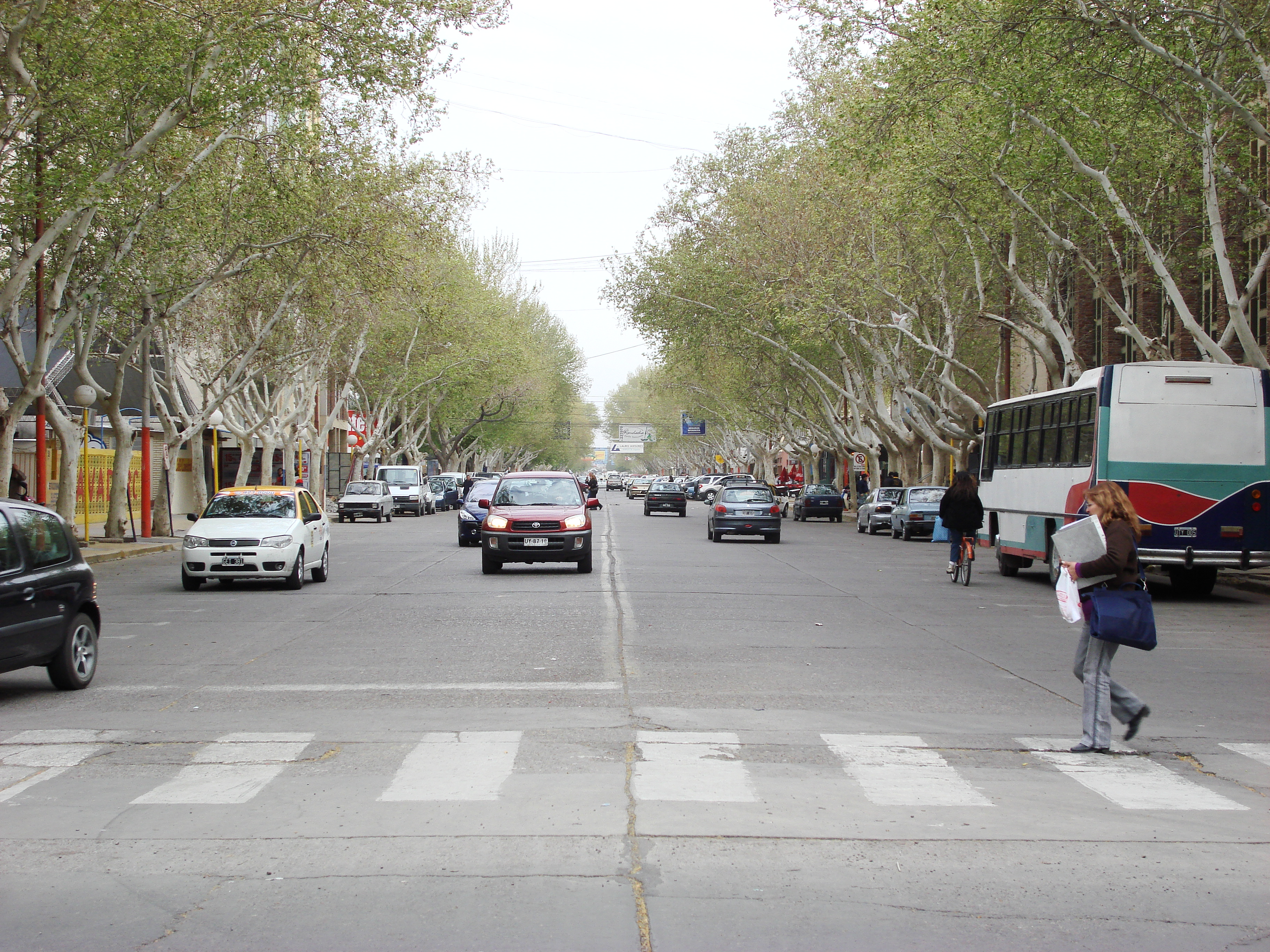 Avenida José Ignacio de la Roza en el centro de la Ciudad de San Juan en el oeste de Argentina